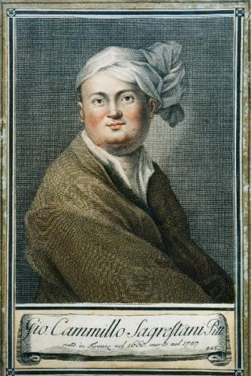 Retrato de Giovanni Camillo Sagrestani, según un grabado del siglo XVIII.